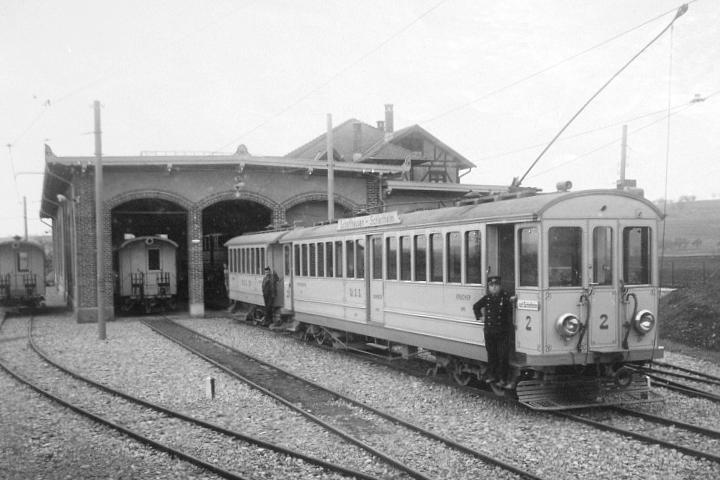 Motorwagen CFe 4/4 Nr. 2 der Strassenbahn Schaffhausen-Schleitheim (StSS) vor der Remise in Siblingen im Jahre der Betriebseröffnung 1905.